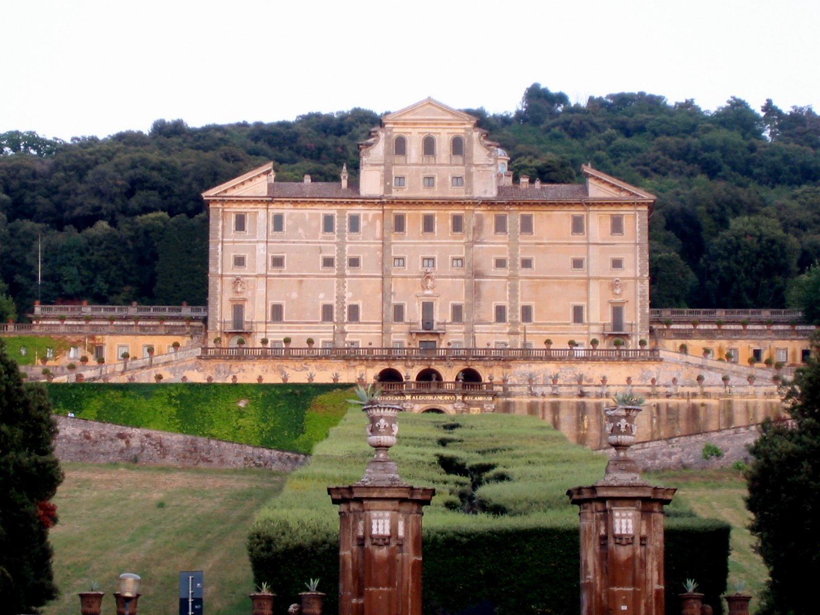 Frascati, Lazio, Italia